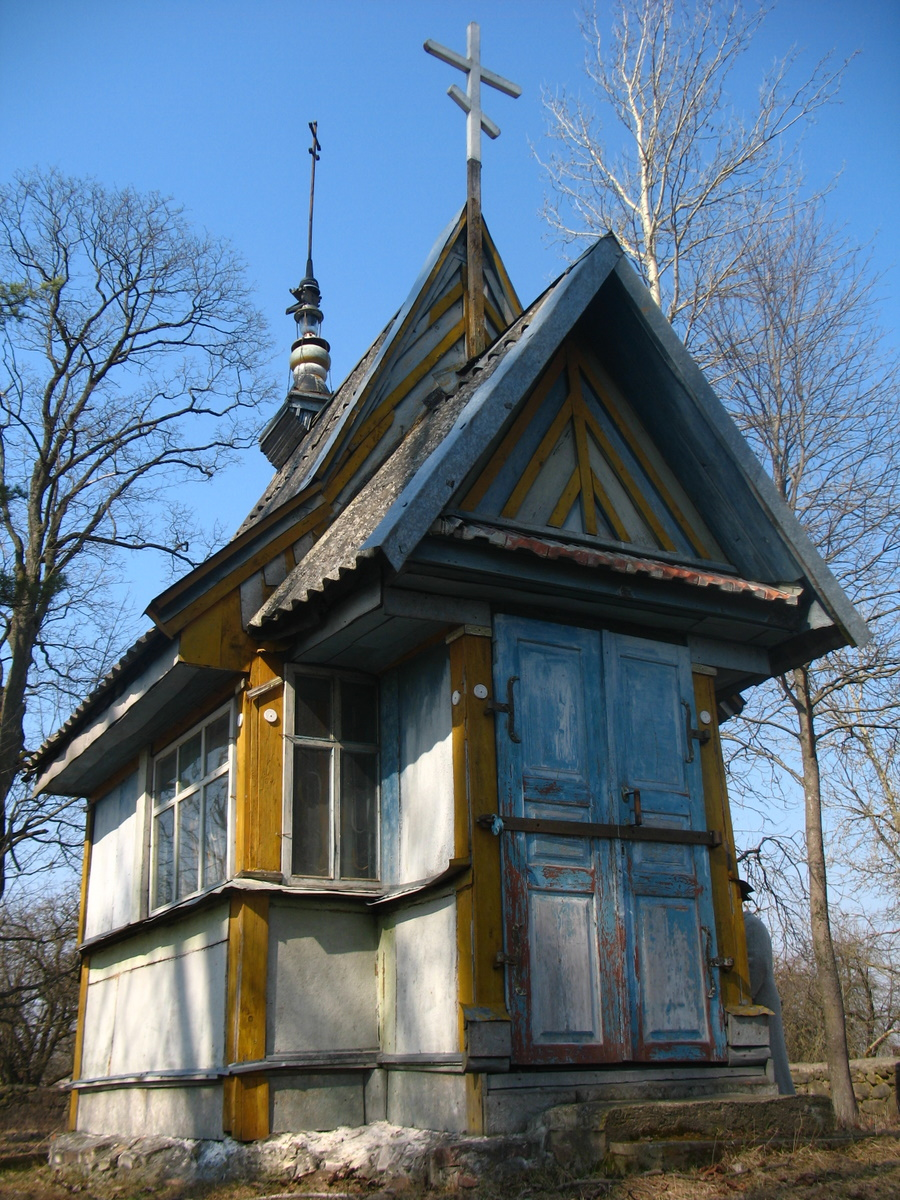 Беларуская (тарашкевіца): Бялавічы